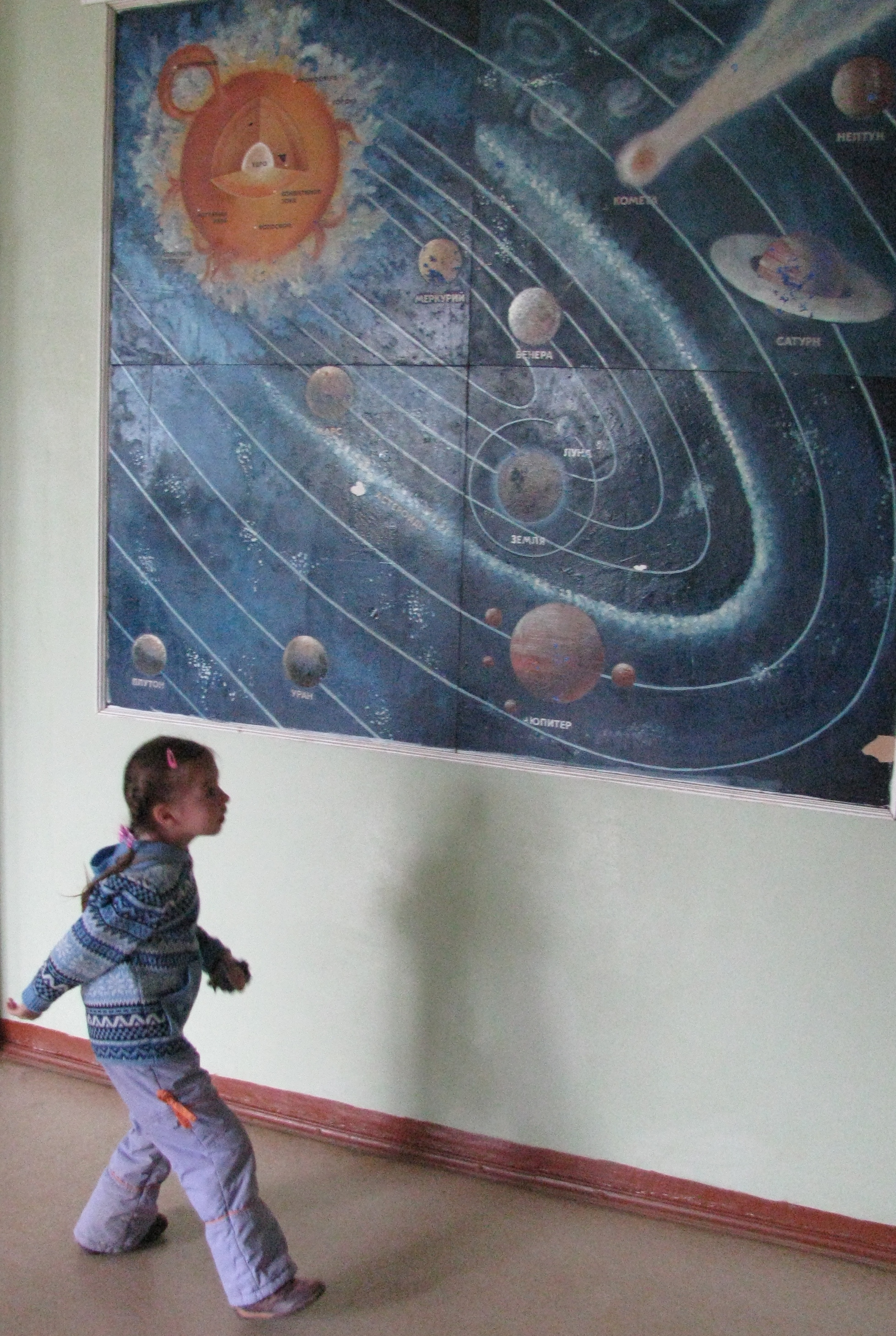 Посетитель Кировского планетария